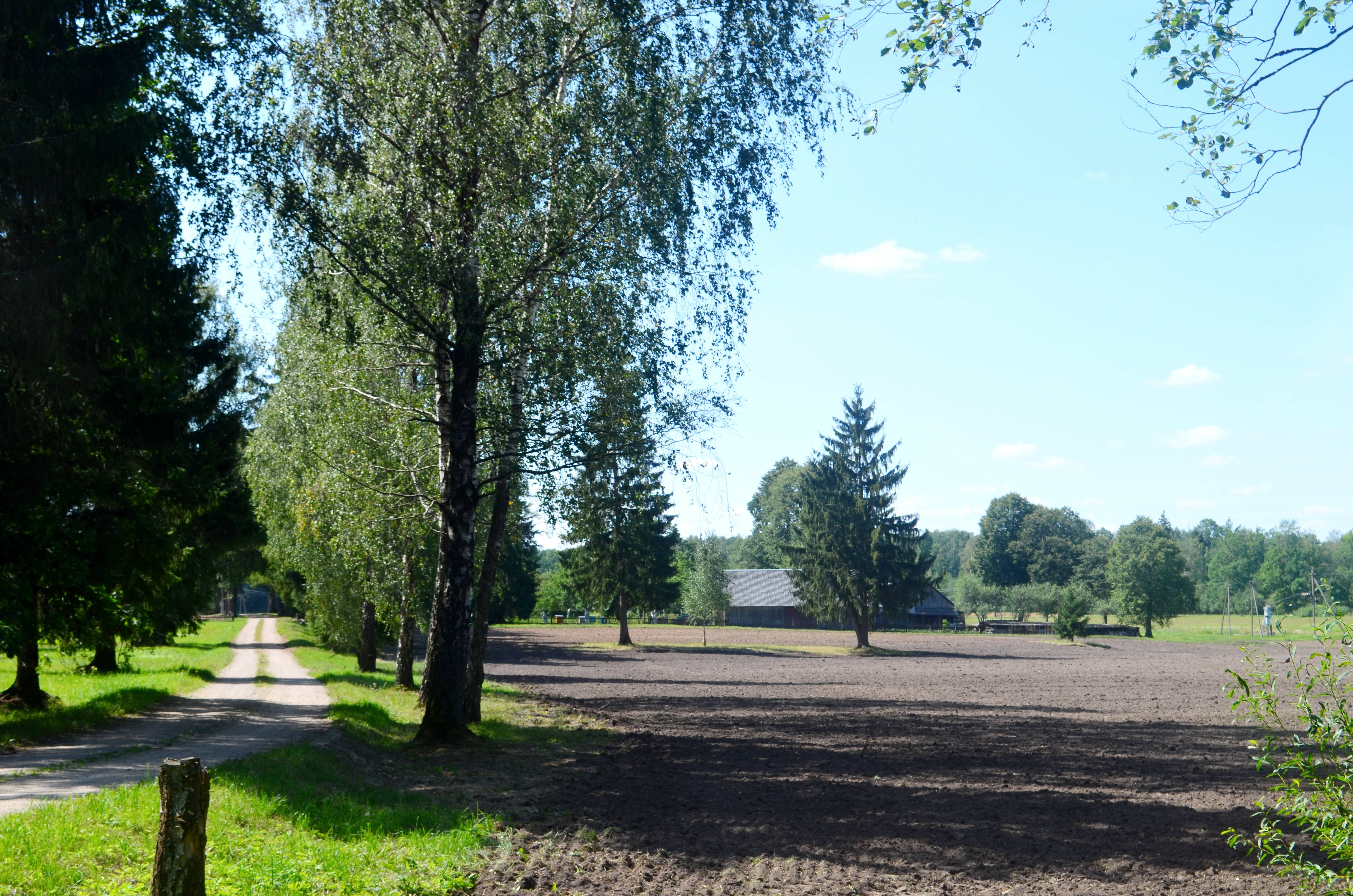 Lapkalnys, Raseinių raj.